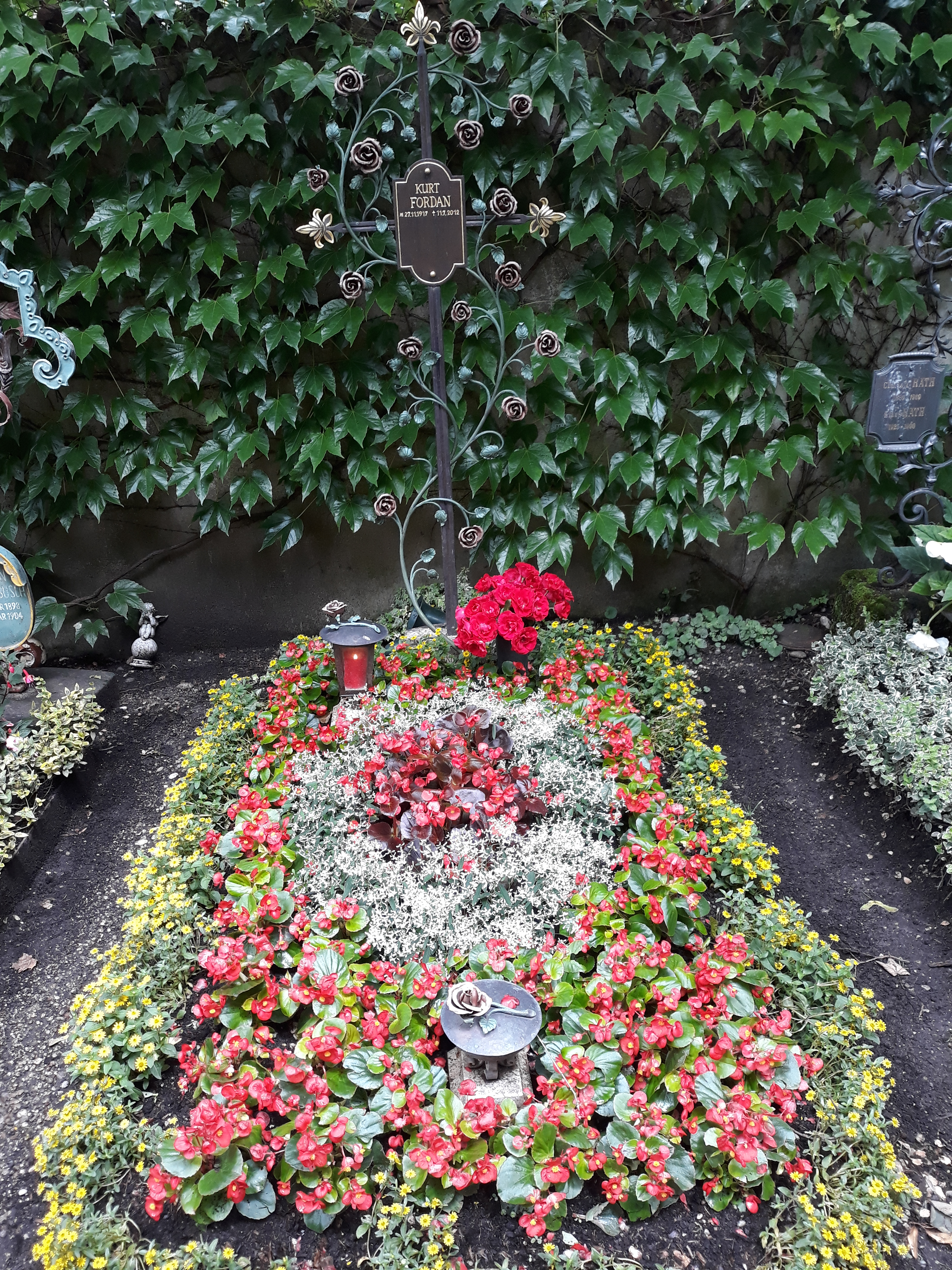 Das Grab des deutschen Textilunternehmers und Politikers (FDP) Kurt Fordan auf dem Bogenhausener Friedhof in München.